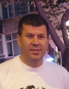 Siyasetçi Şerdil Dara Odabaşı